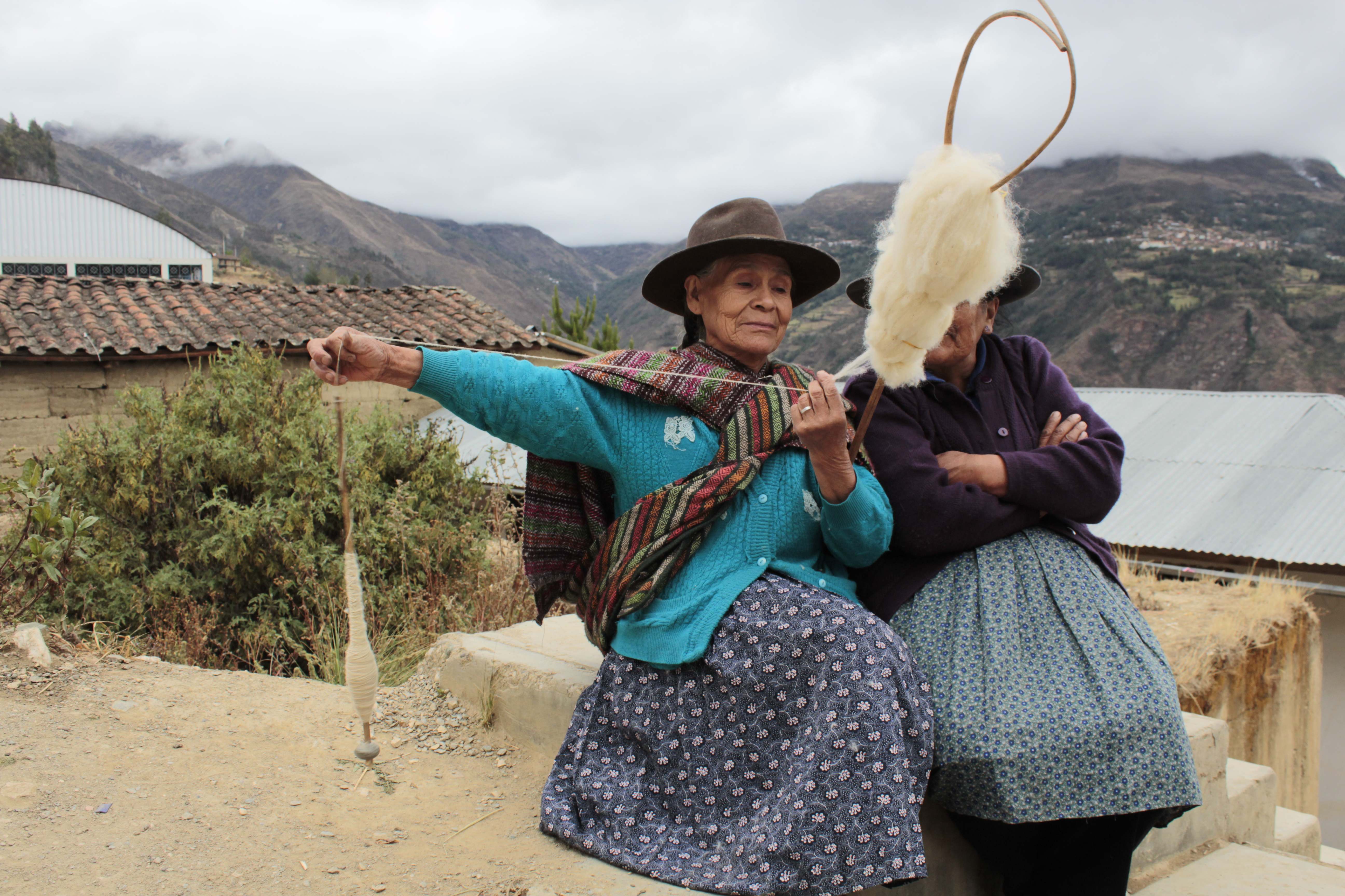 Hilar es una práctica de gran valor humanístico que se está perdiendo debido a que los jóvenes le han perdido el interés.